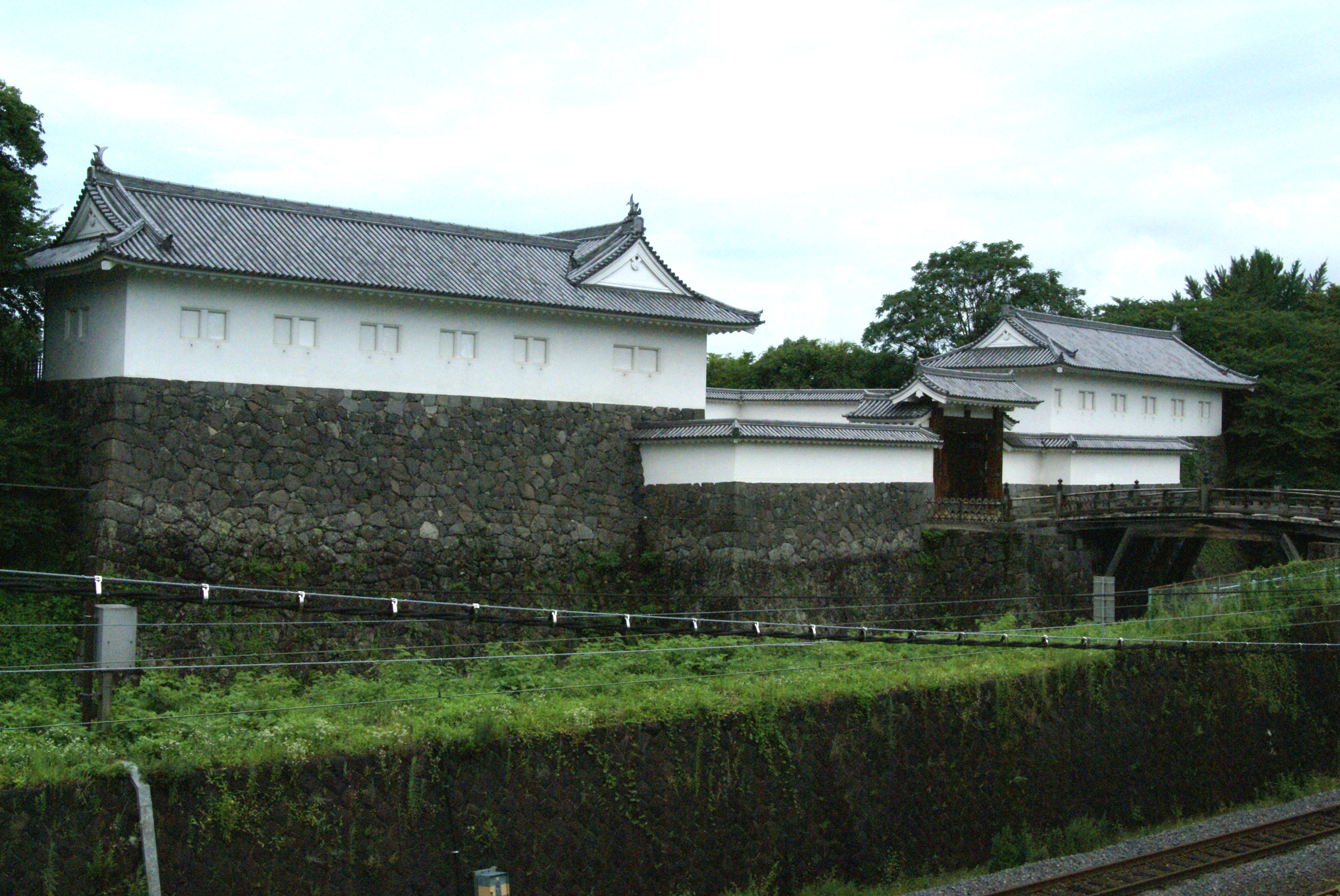 山形城二の丸東大手門